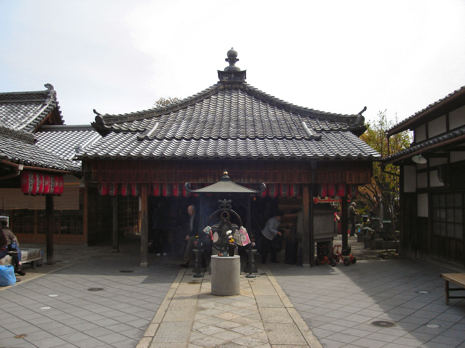 石像寺(釘抜地蔵)